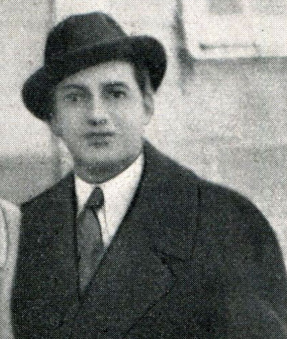 Il regista USA Mervin Le Roy in una immagine ripresa al porto di Napoli nel 1934 durante un suo viaggio in Italia